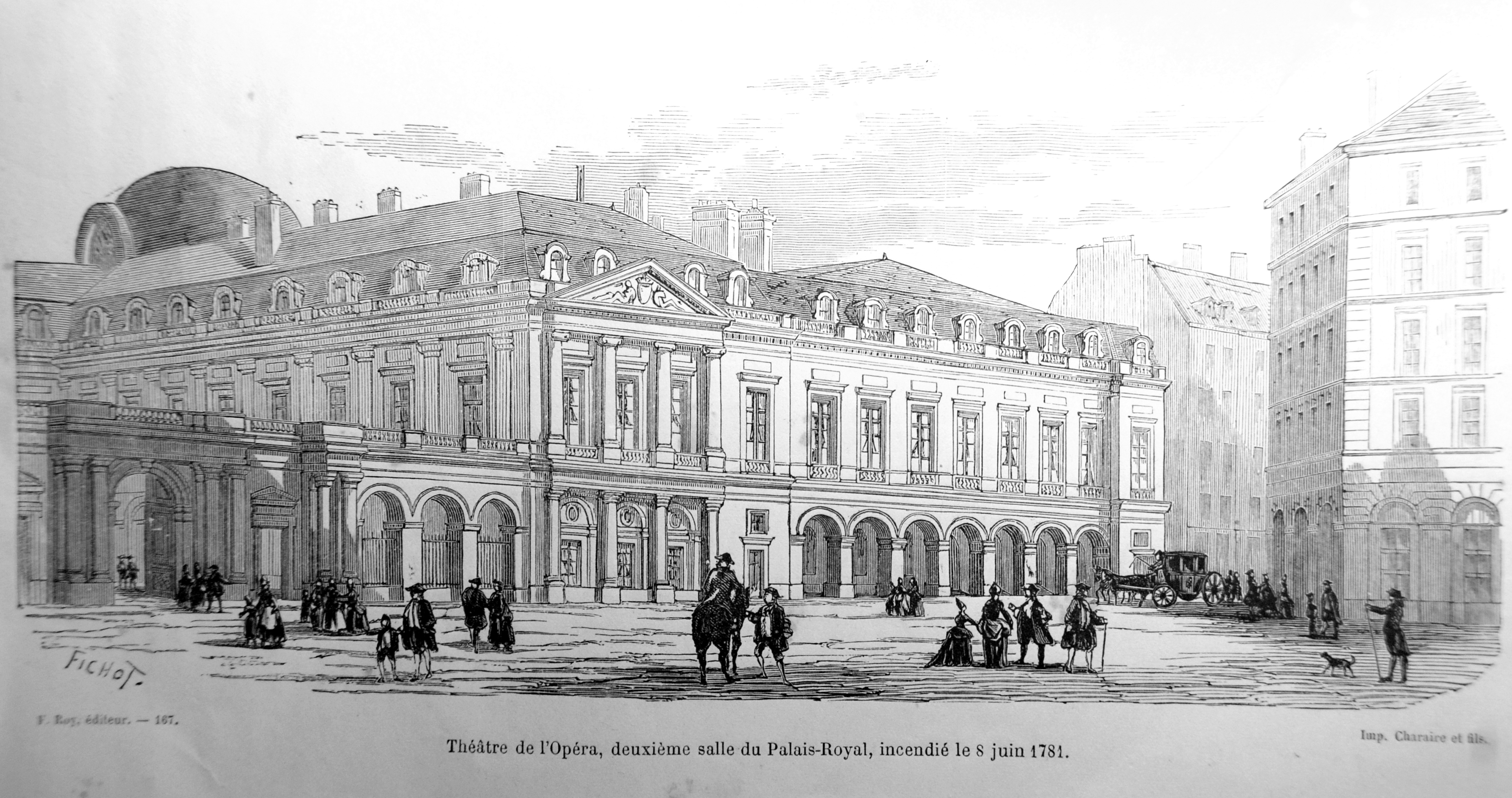 Théâtre de l'Opéra de Paris, deuxième salle du Palais-Royal, incendié le 8 juin 1781